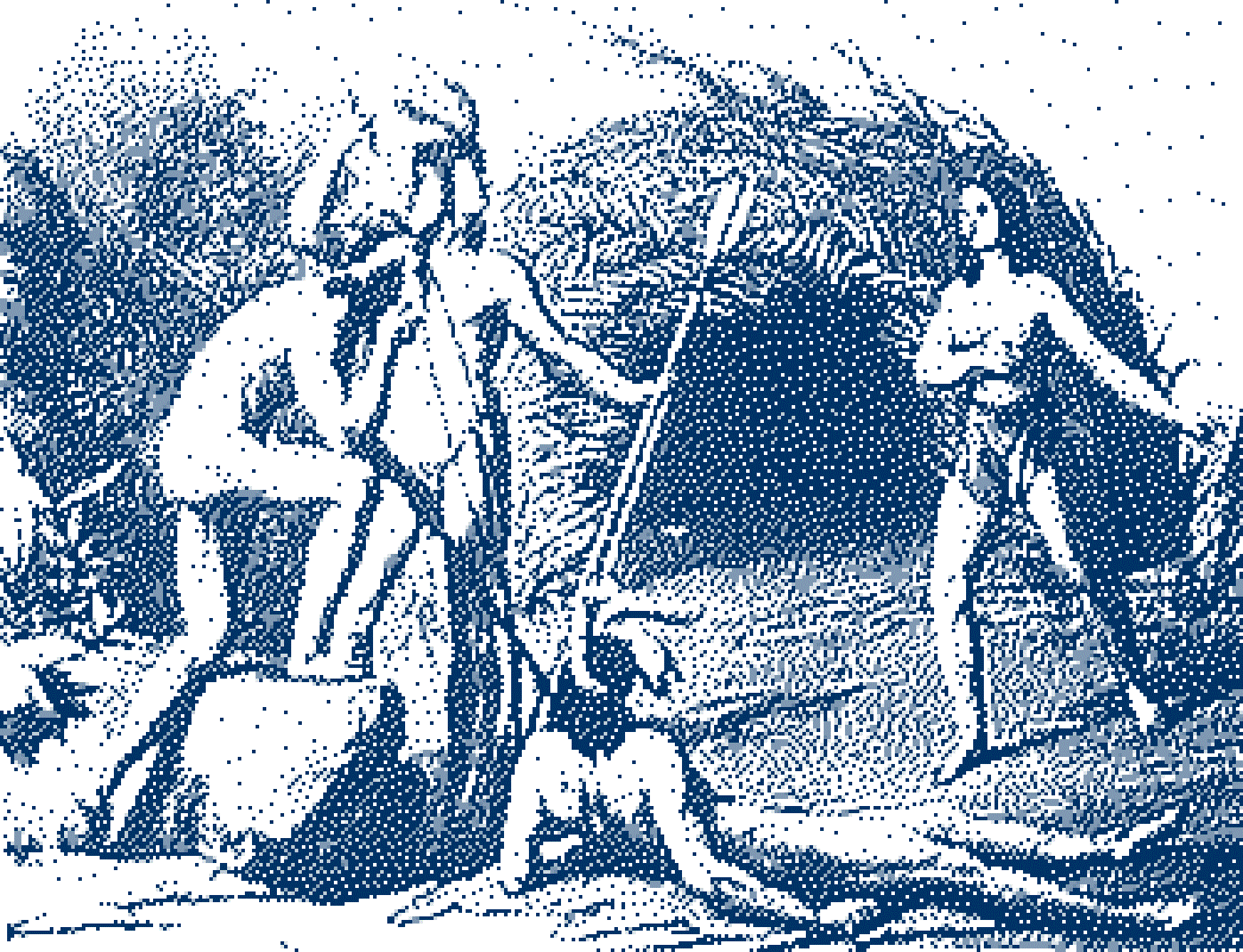 Guaranies Ava - Taragui